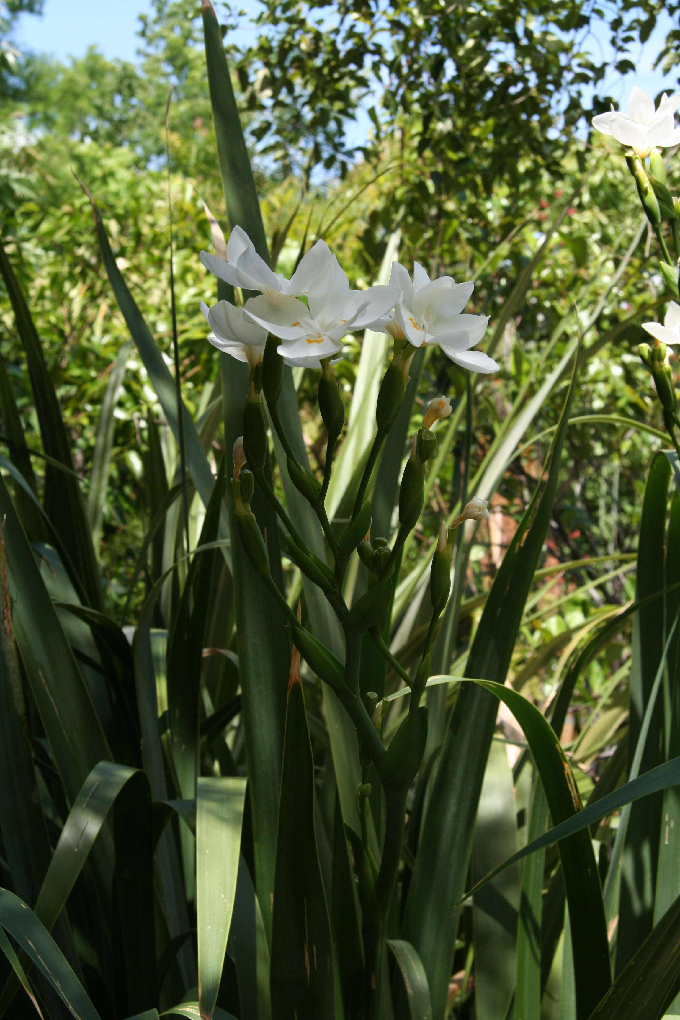 Dietes robinsoniana im Botanischen Garten Dresden